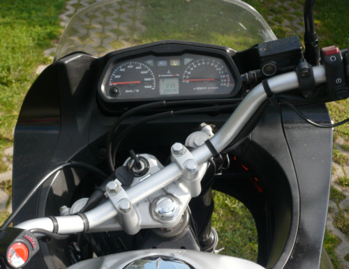 Cockpit einer Honda Varadero XL 125 V Baujahr 2001